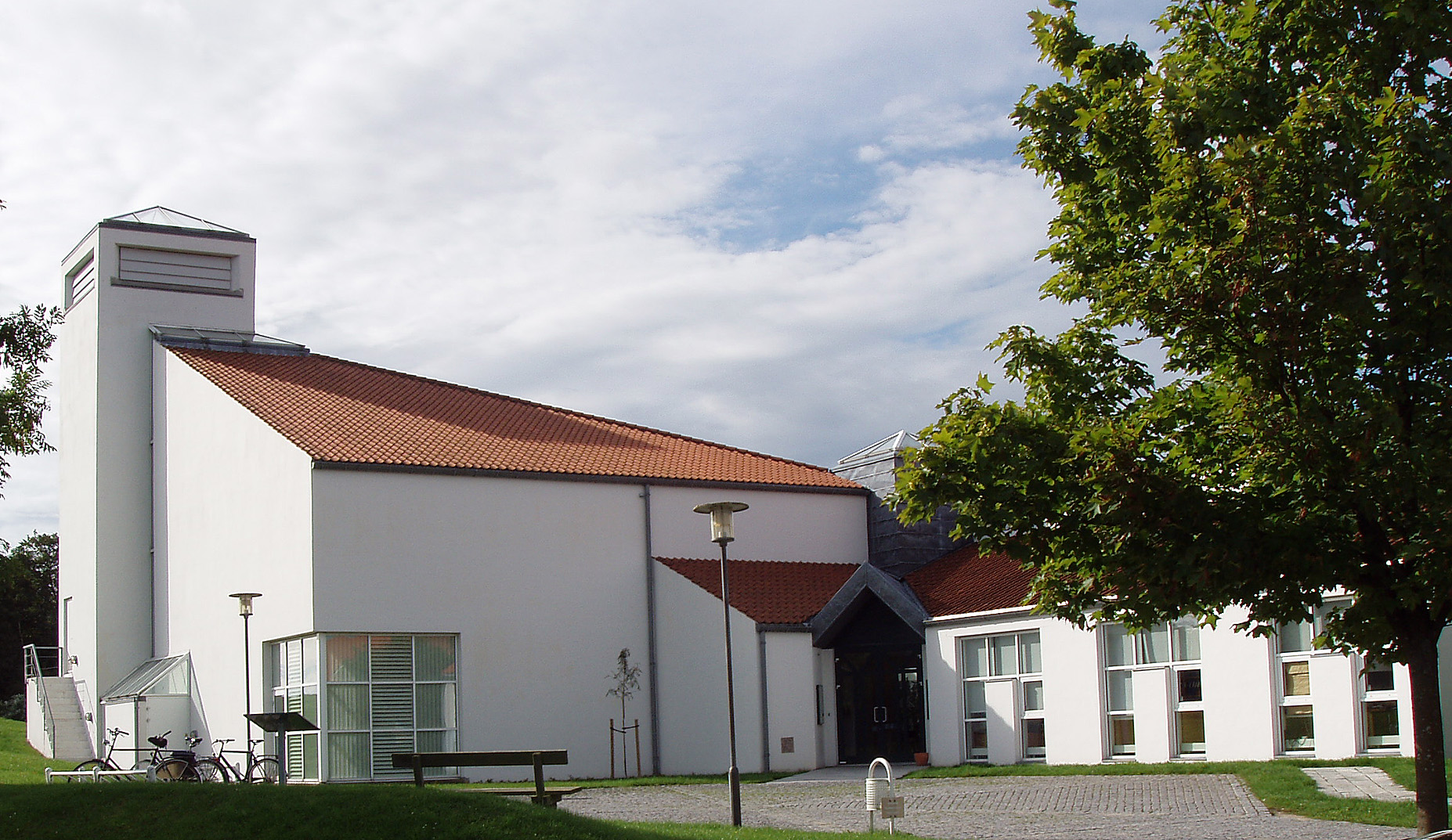 Lystrup Kirke ved Århus, Vester Lisbjerg Herred, Århus Amt